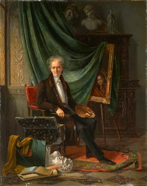 Portrait de Benjamin Rolland (1777-1855) dans son atelier. Peintre et conservateur du musée de Grenoble de 1817 à 1853.